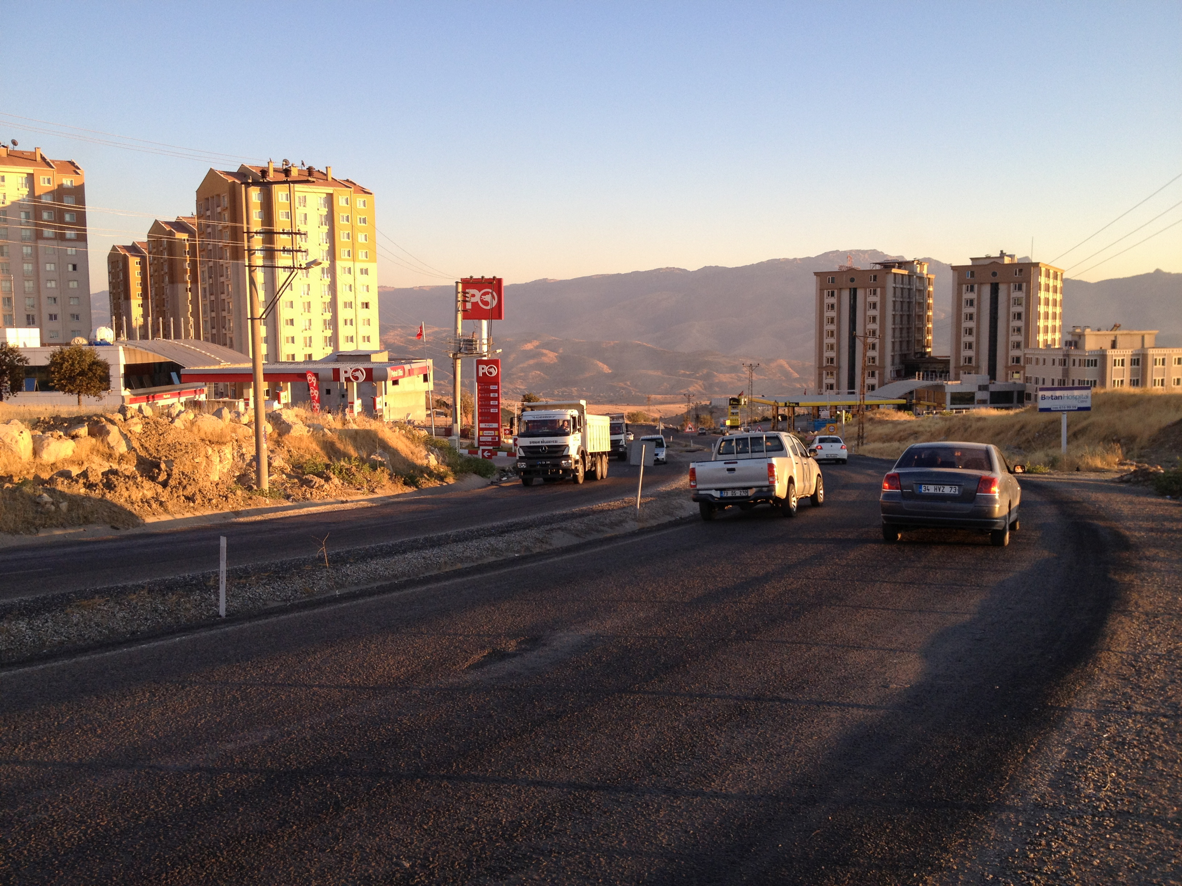 Sirnak im Abendlicht, im Hintergrund die Cudi-Bergkette.